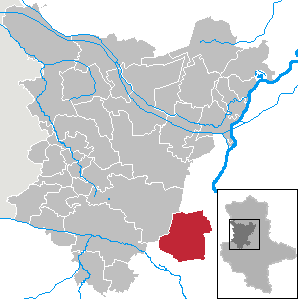 Sülzetal in Saxony-Anhalt (Country) - District (Landkreis) Börde